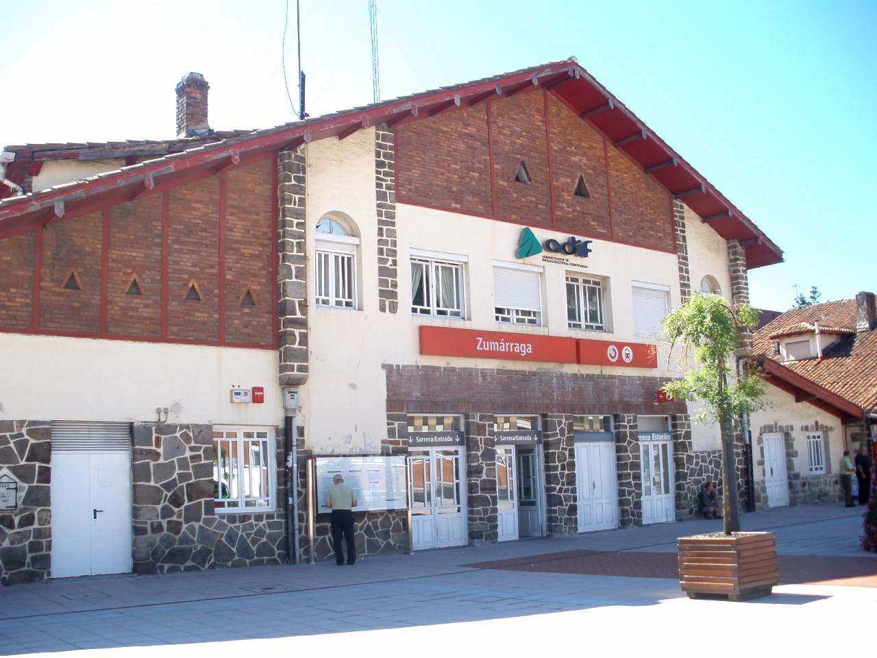 Estación de tren de Zumarraga (Gipuzkoa)